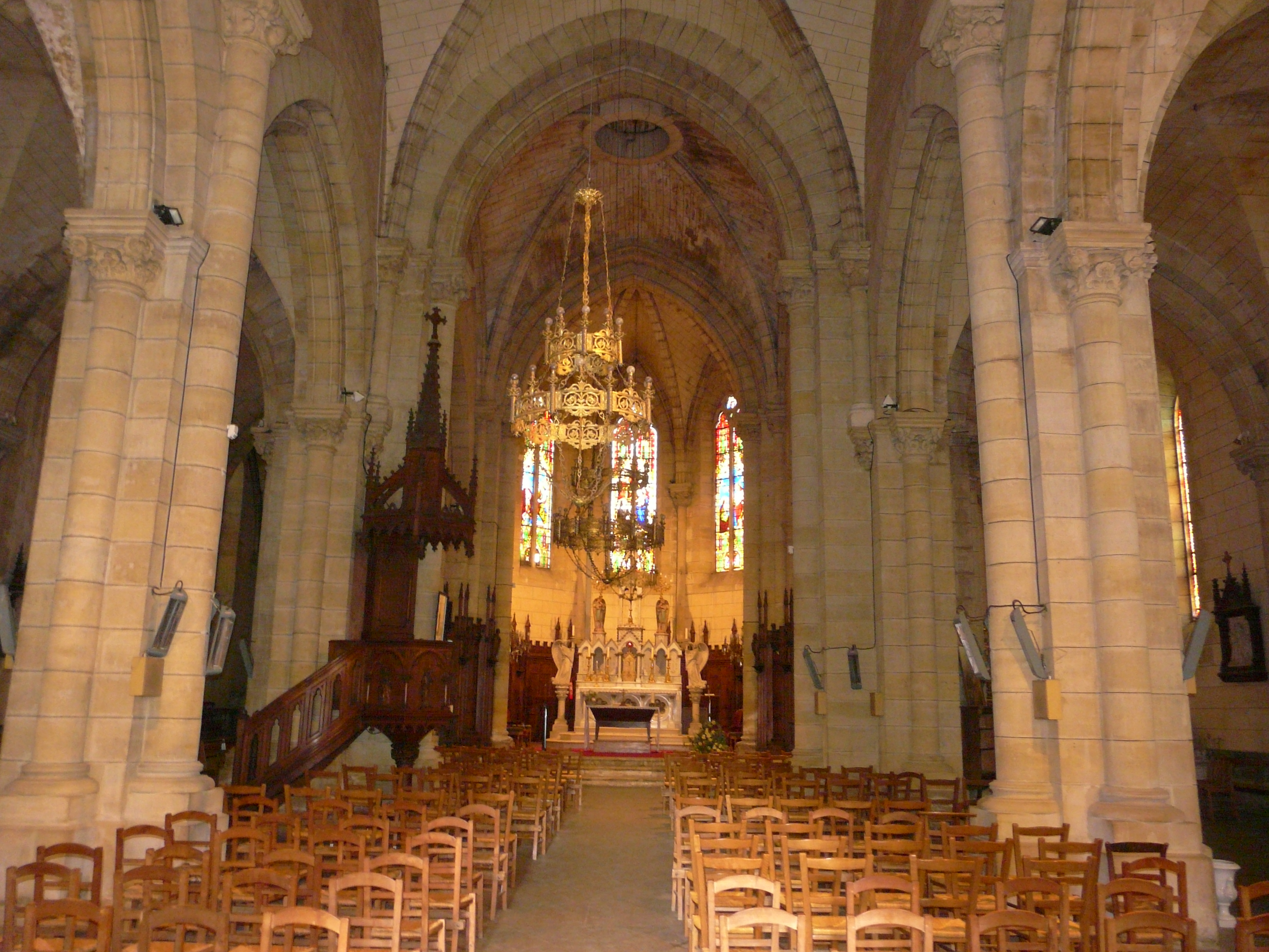 La nef de l'église Saint-Thomas, Excideuil, Dordogne, France.